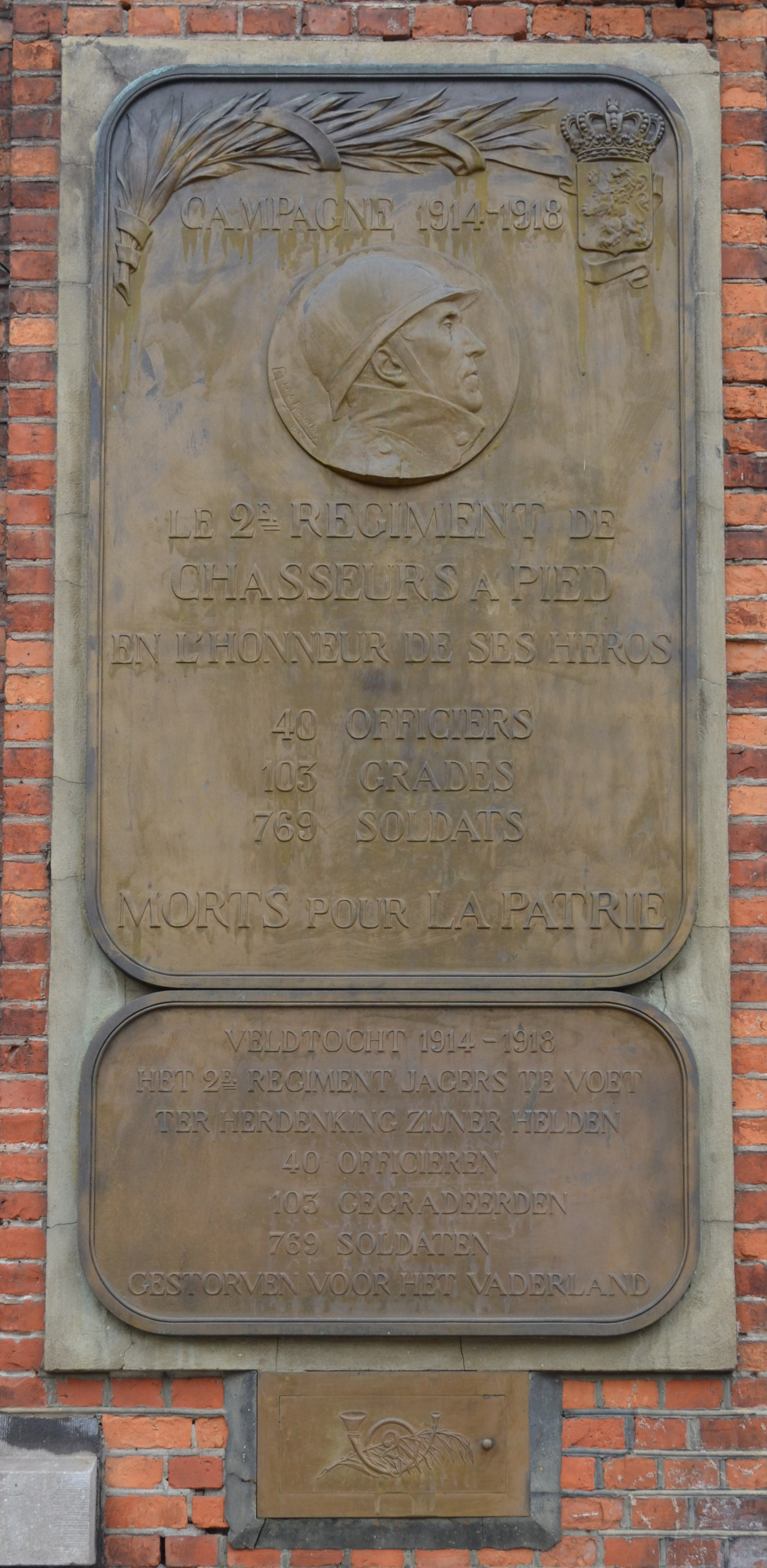 Plaque commémorative placée dans la cours de l'ancienne caserne d'infanterie "Caserne caporal Trésignies", avenue Général Michel à Charleroi (Belgique). Texte : "Campagne 1914-1918Le 2e régiment de chasseur à pied en l'honneur de ses héros40 officiers103 gradés769 soldatsmorts pour la patrie."